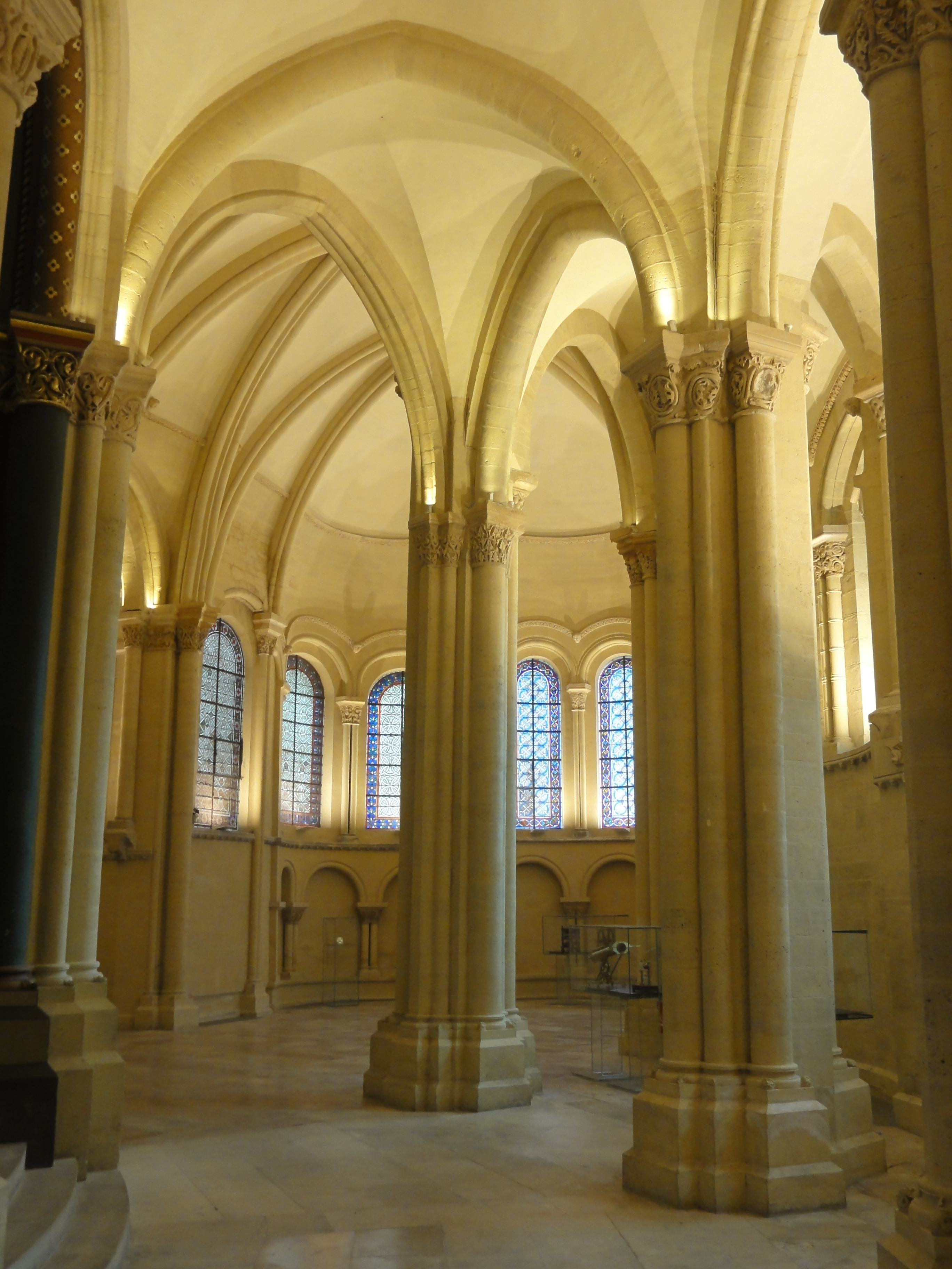 Déambulatoire sud, vue vers le nord.